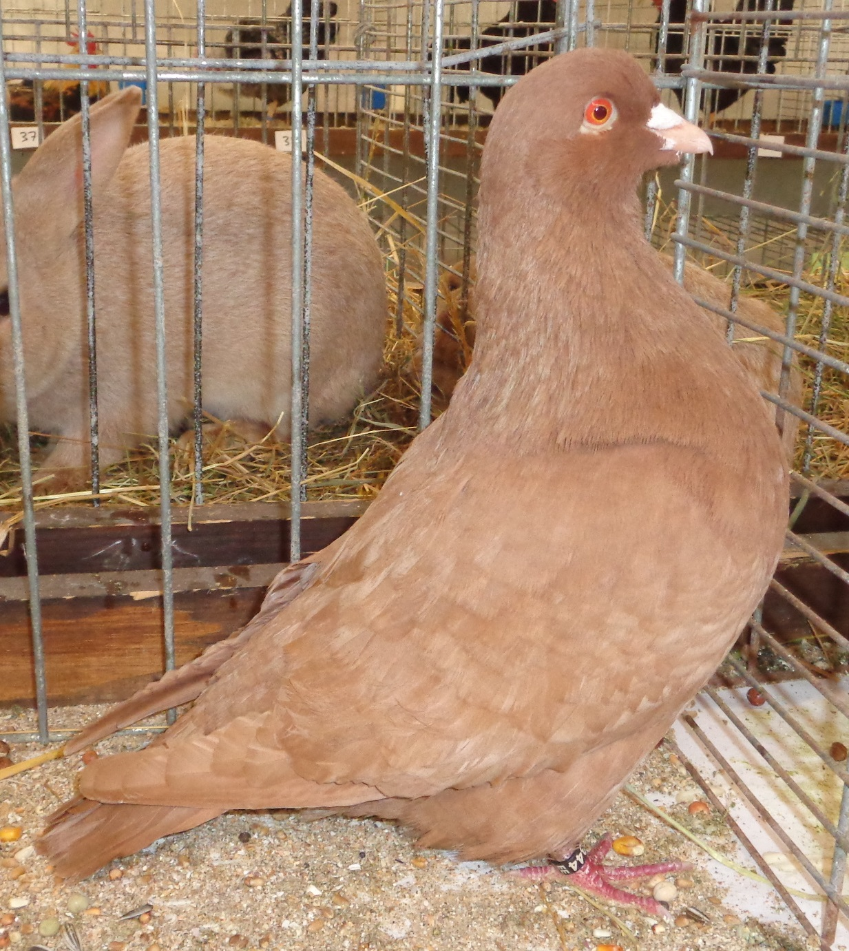 Pigeon carneau jaune